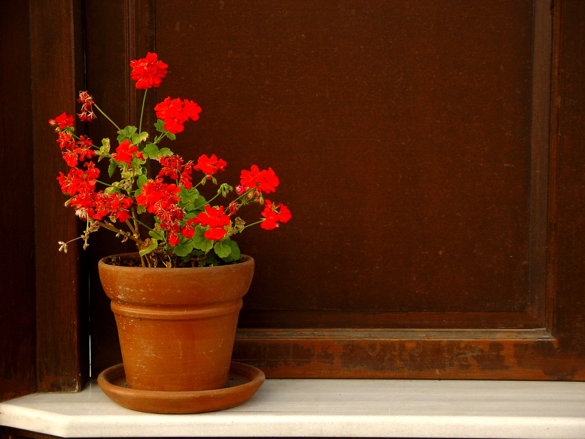 Istanbul Turkey